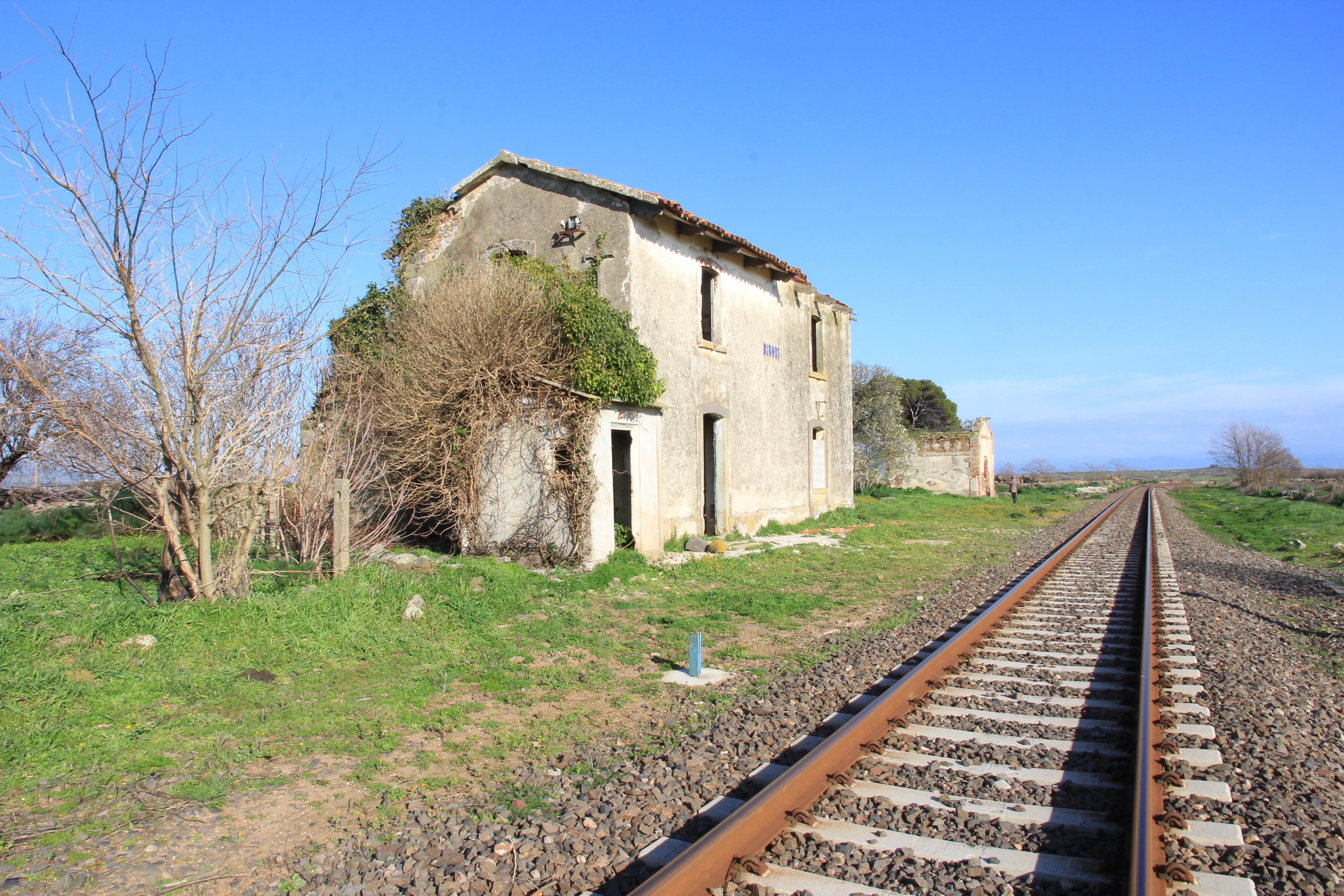 Ex stazione ferroviaria FS di Birori